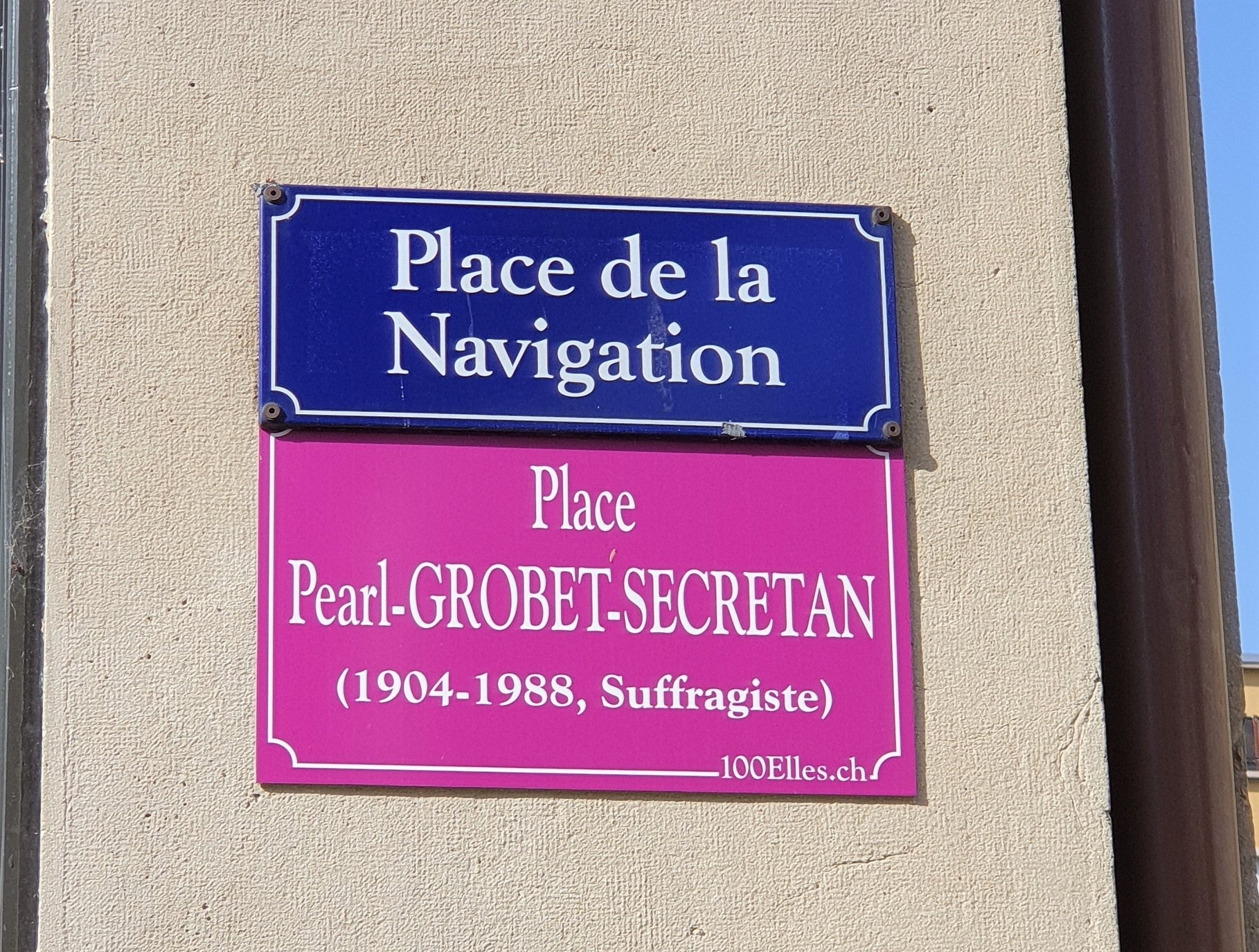 Plaque temporaire de rue apposée dans le cadre du projet 100elles à Genève en 2019